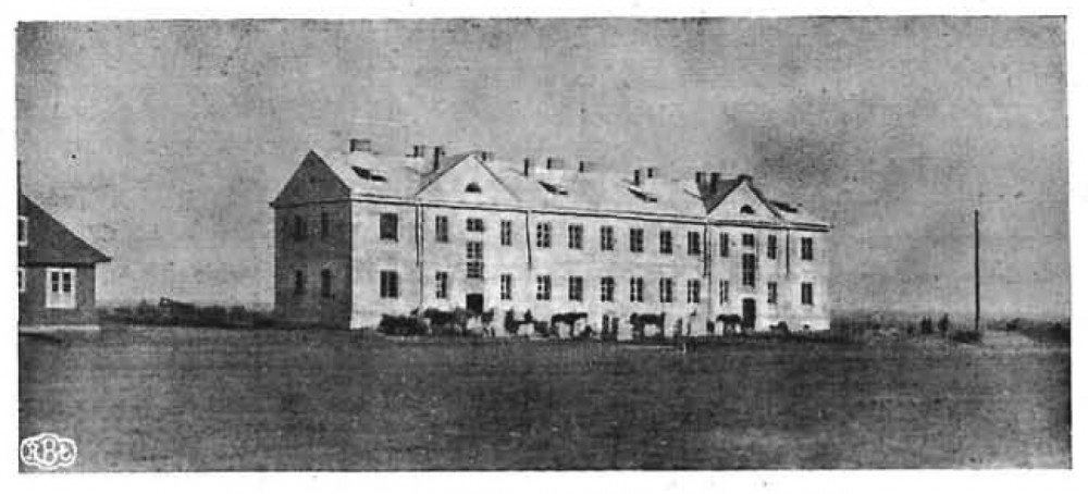 Беларуская (тарашкевіца): Маладэчна (Maładečna), Гелянова (Helanova)